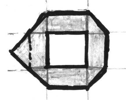 Schematischer Grundriss des siebeneckigen Bergfrieds von Burg Gräfenstein: Achteck + Dreieck